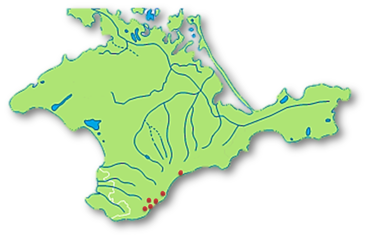 Поширення_адіанту_венериного_волосу_в_Криму.: Поширення_адіанту_венериного_волосу_в_Криму.